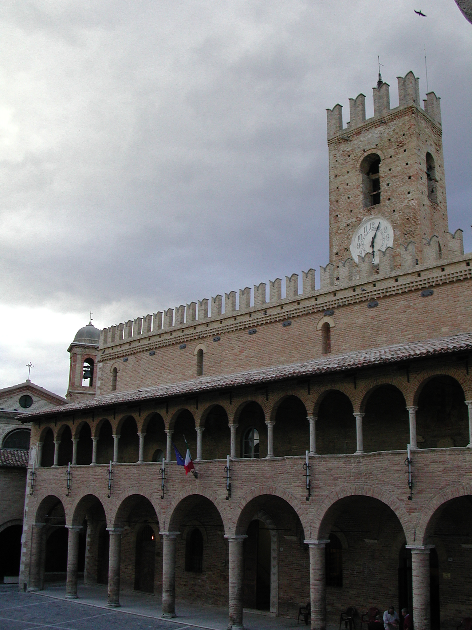 Palazzo Municipale di Offida.